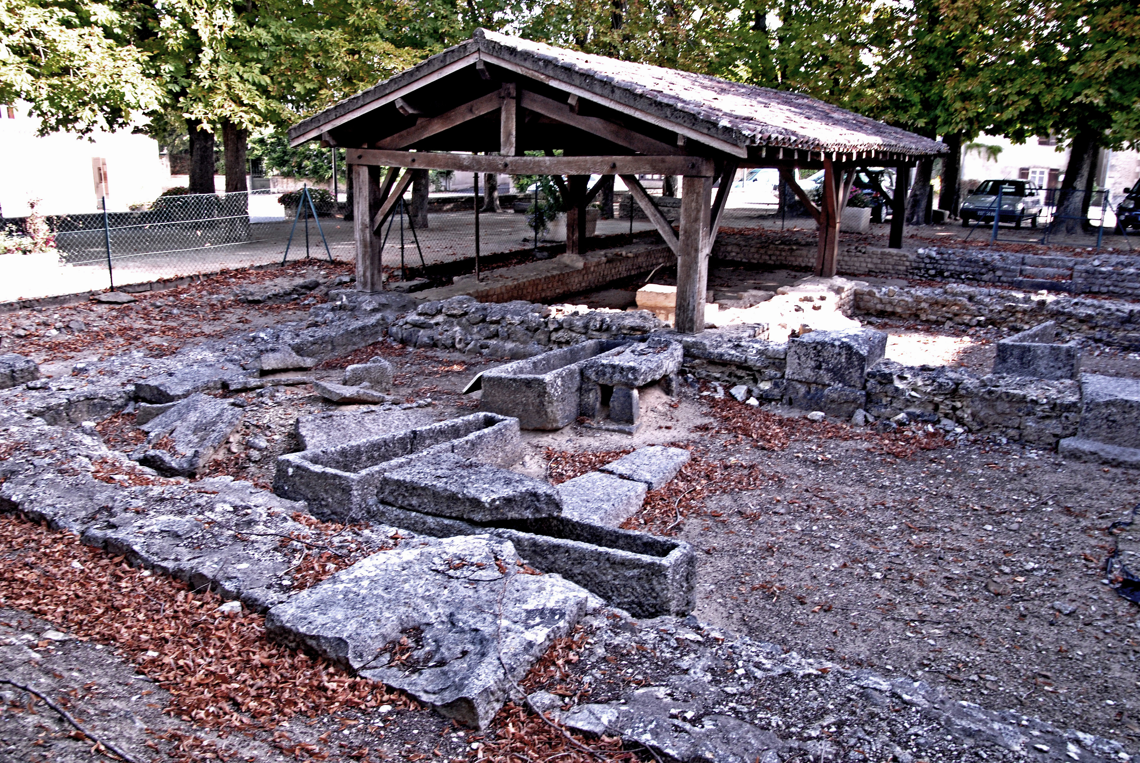 Ausgrabungen gallo-römischer Tempel 1.u.2.Jh.